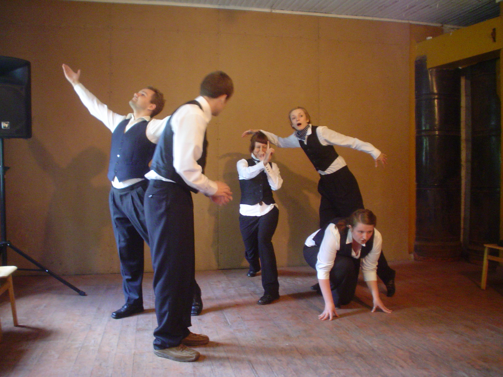 Improvisatsioonikava "Theodor Altermann"